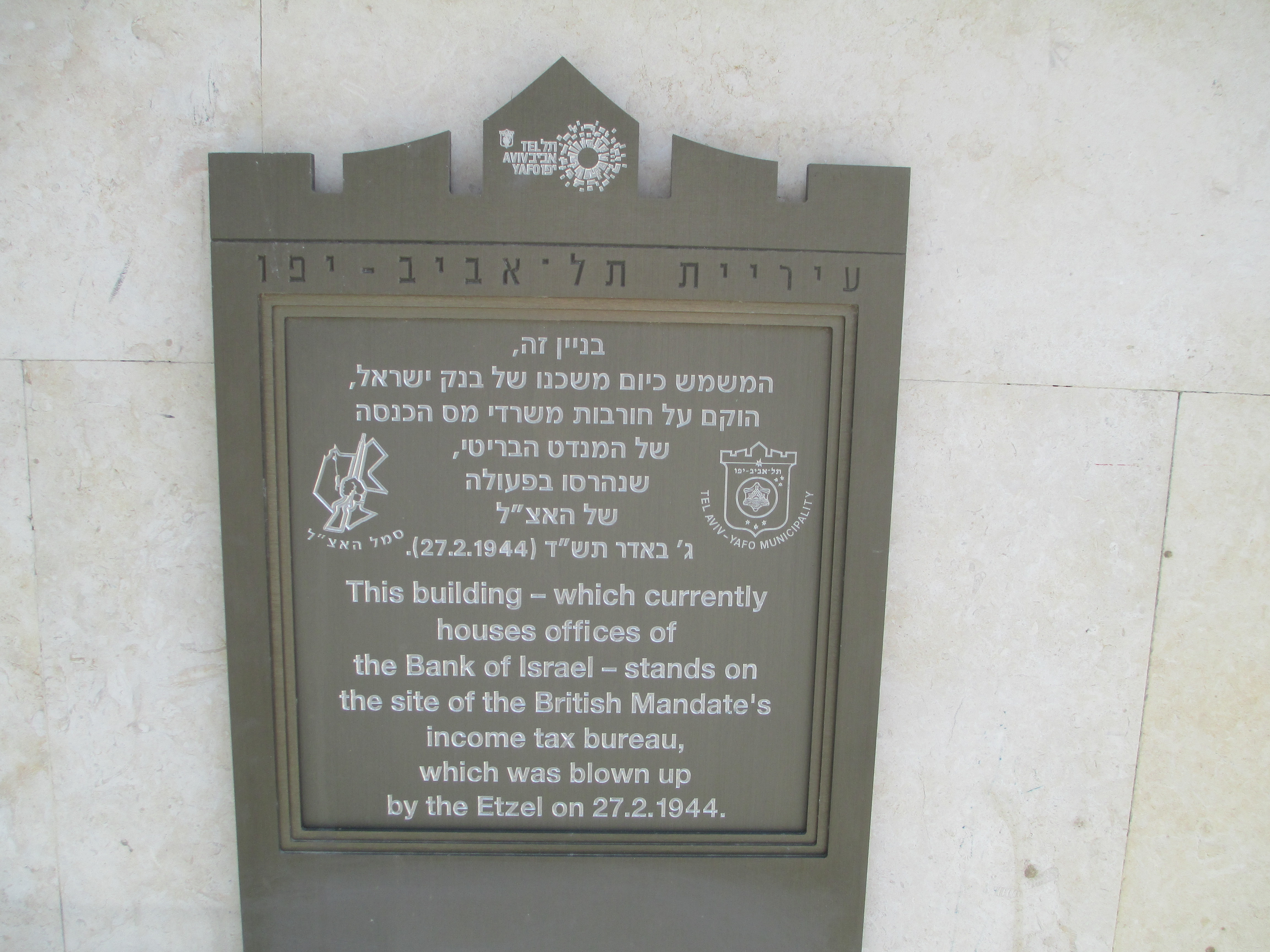 לוחית זיכרון להתקפת אצ"ל על משרדי מס הכנסה המנדטורי בתל אביב ברחוב נחלת בנימין 69